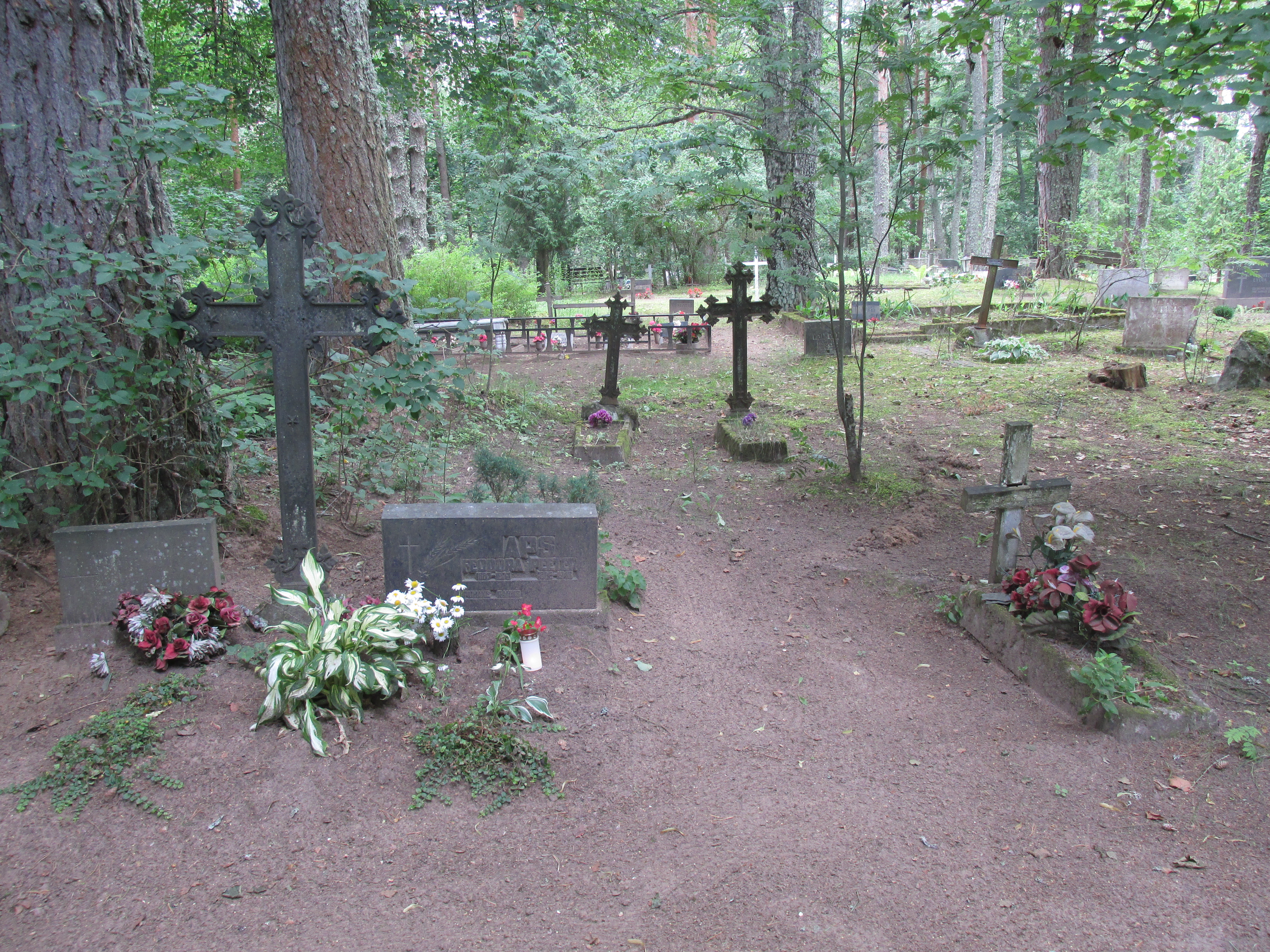 Leevi kalmistu